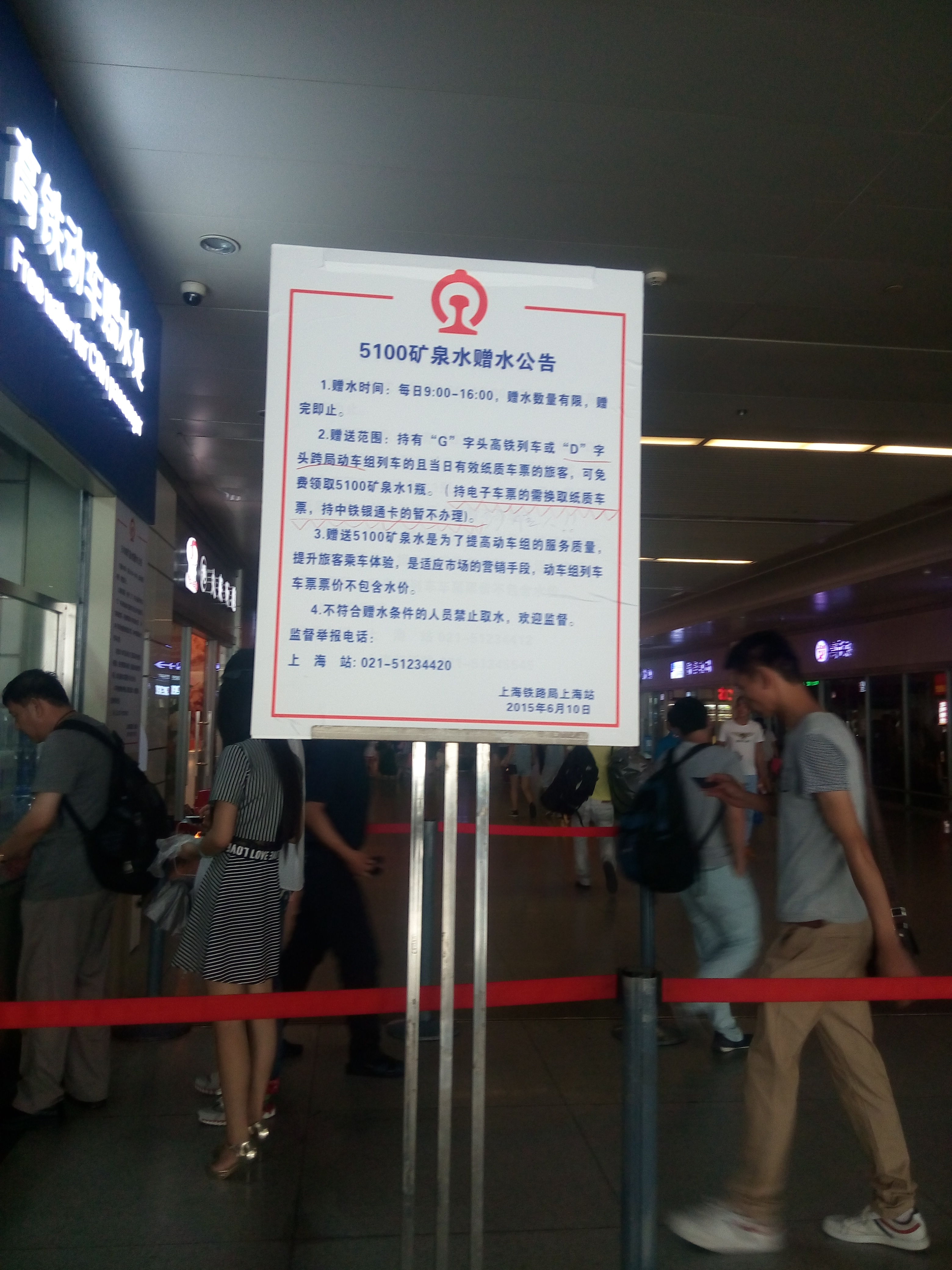 上海站。。